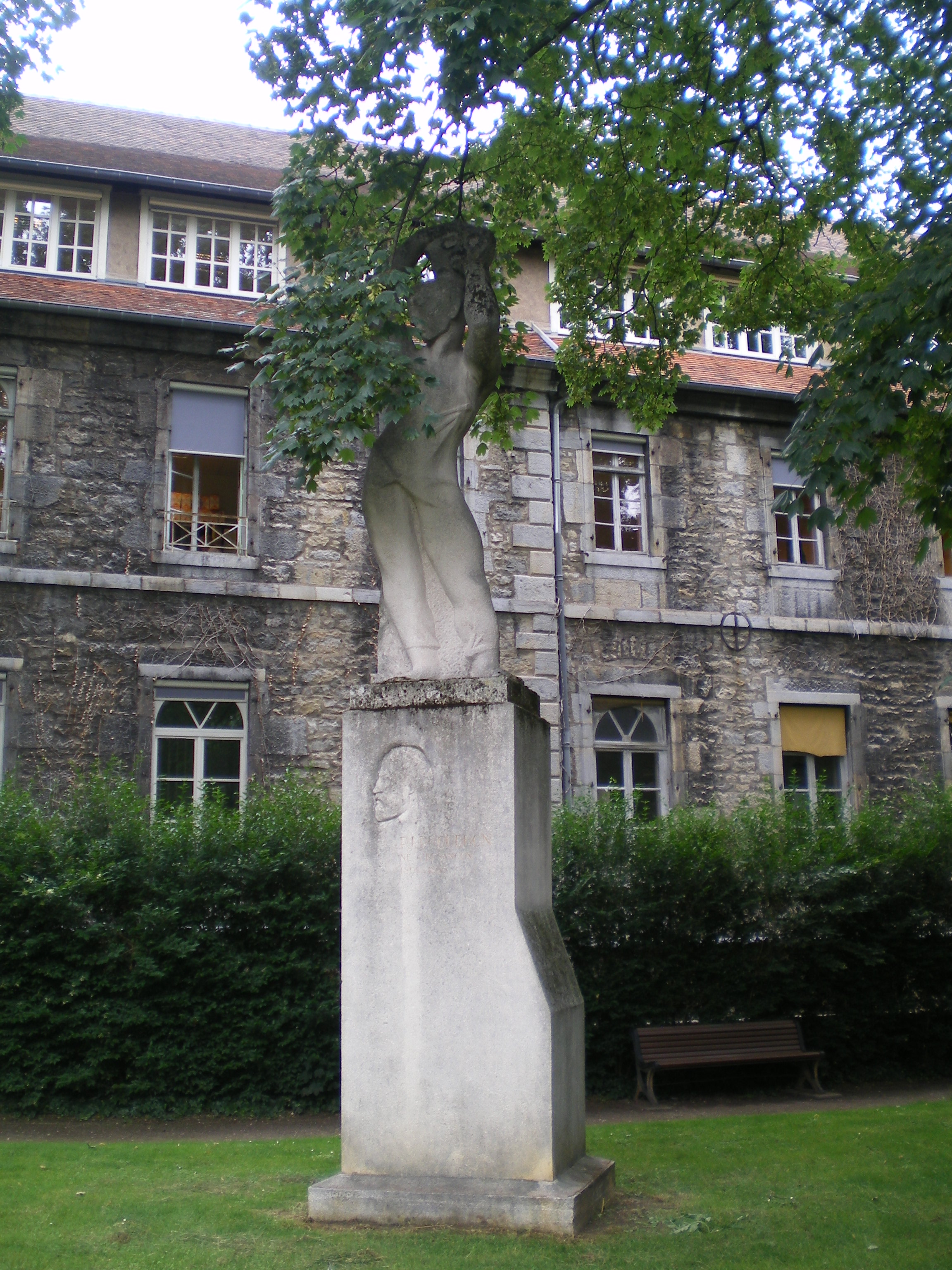 Mausolée